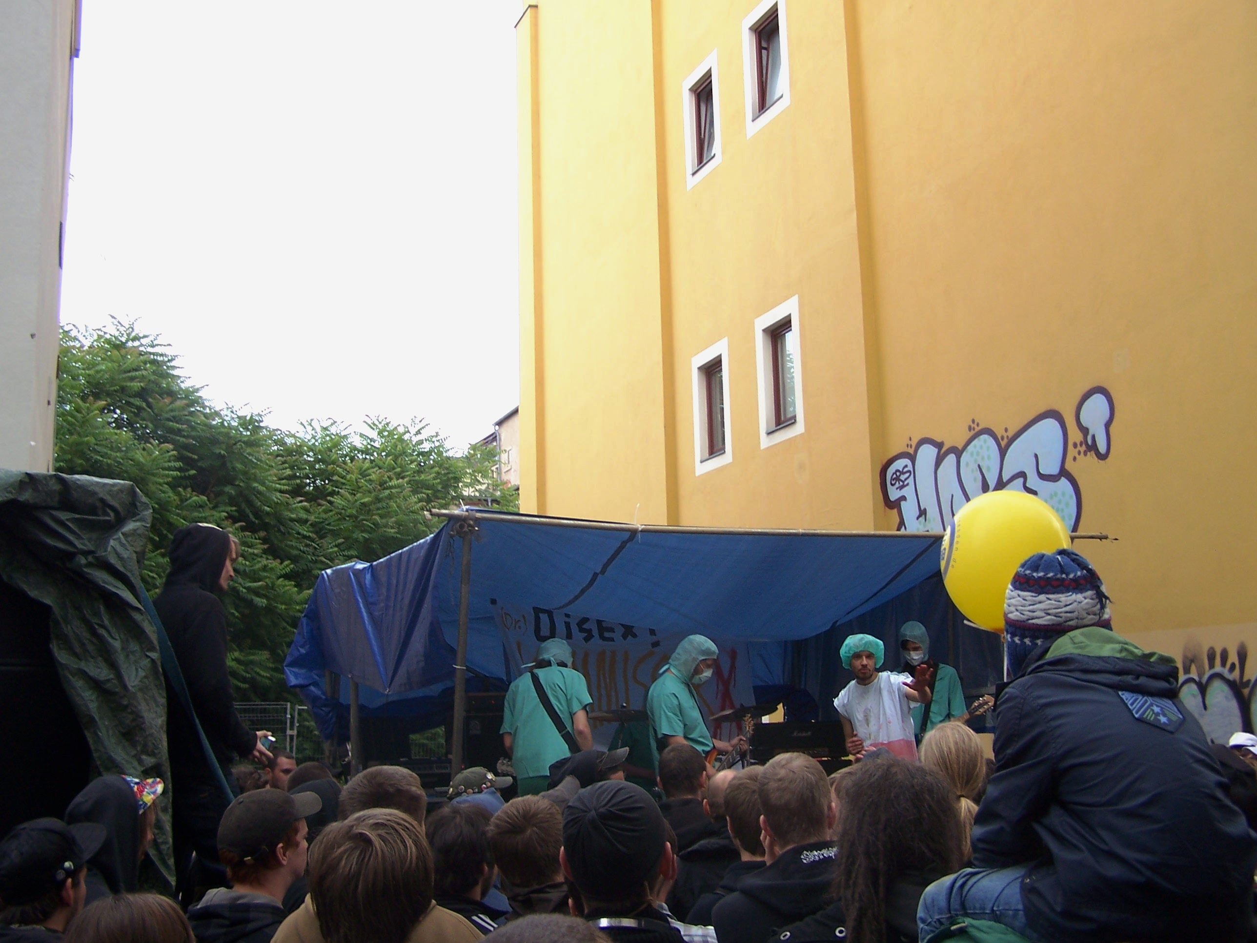 Eine der zahlreichen kleinen Bühnen auf der Bunten Republik Neustadt in Dresden